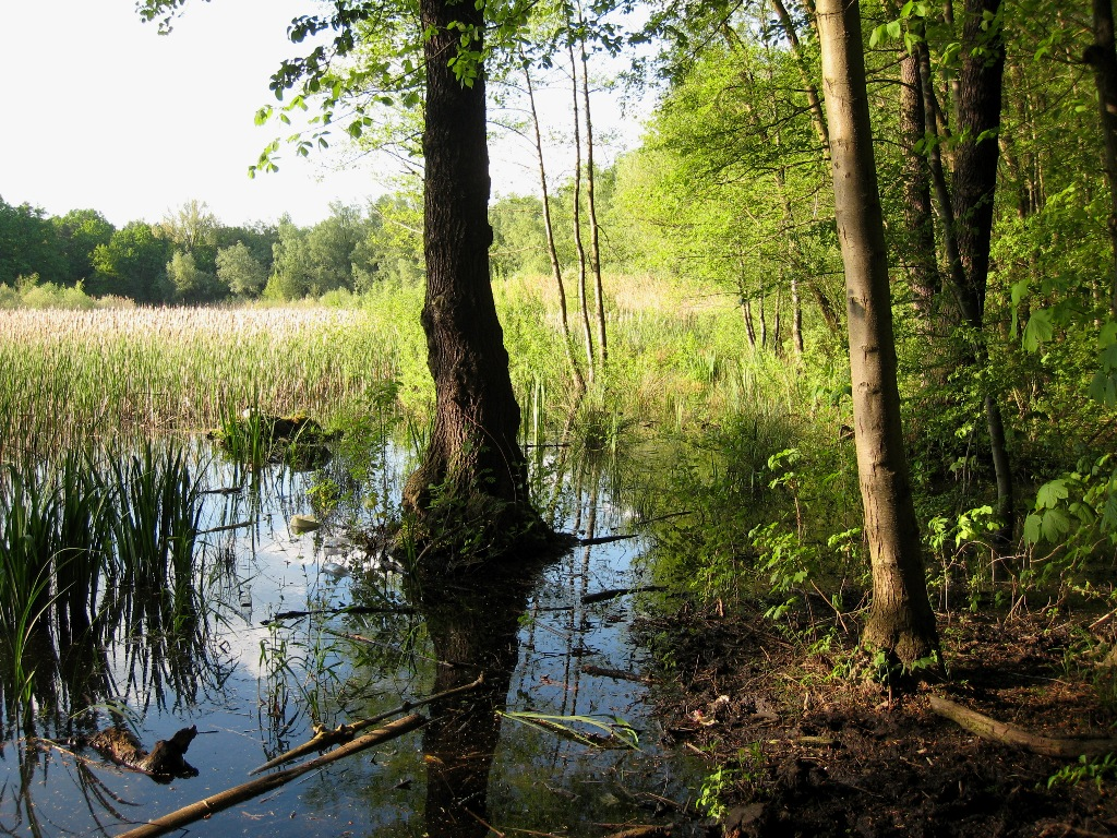 Uferbereich des Faulen Sees in Berlin Weißensee